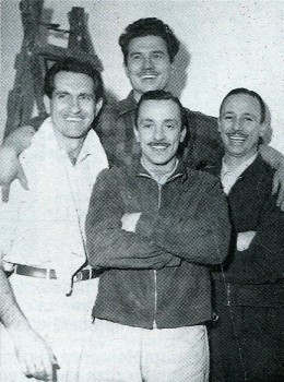 Pablo Birger (arriba), Carlos Menditeguy, Juan Gálvez y Oscar Gálvez (abajo, de izquierda a derecha) en el Autódromo de Buenos Aires, en 1953.